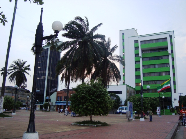 Alcaldía de Florencia y Torre Jorge Eliécer Gaitán en la Plaza Pizarro, centro de Florencia, Caquetá